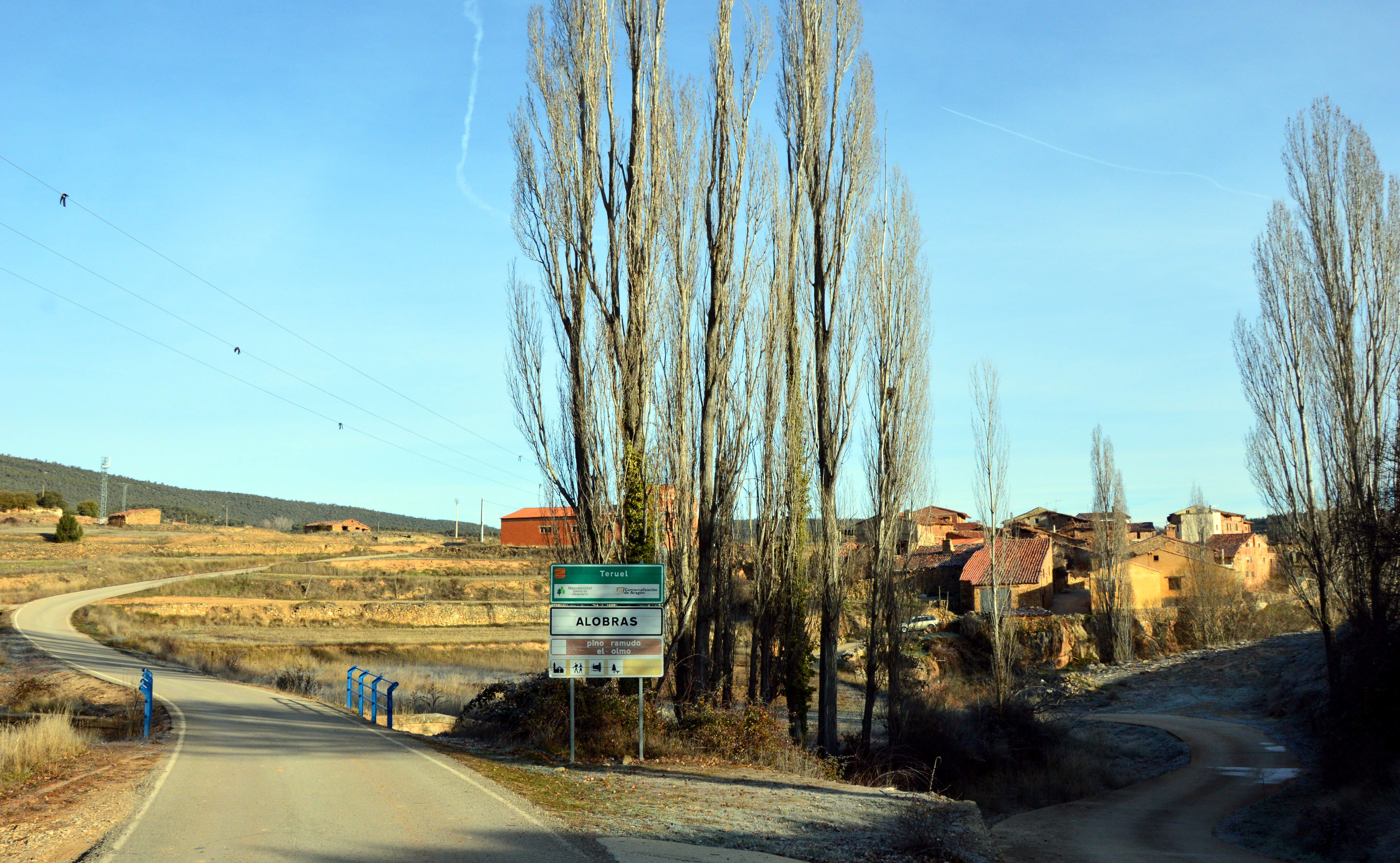 Detalle de la entrada meridional a Alobras (Teruel), año 2017.